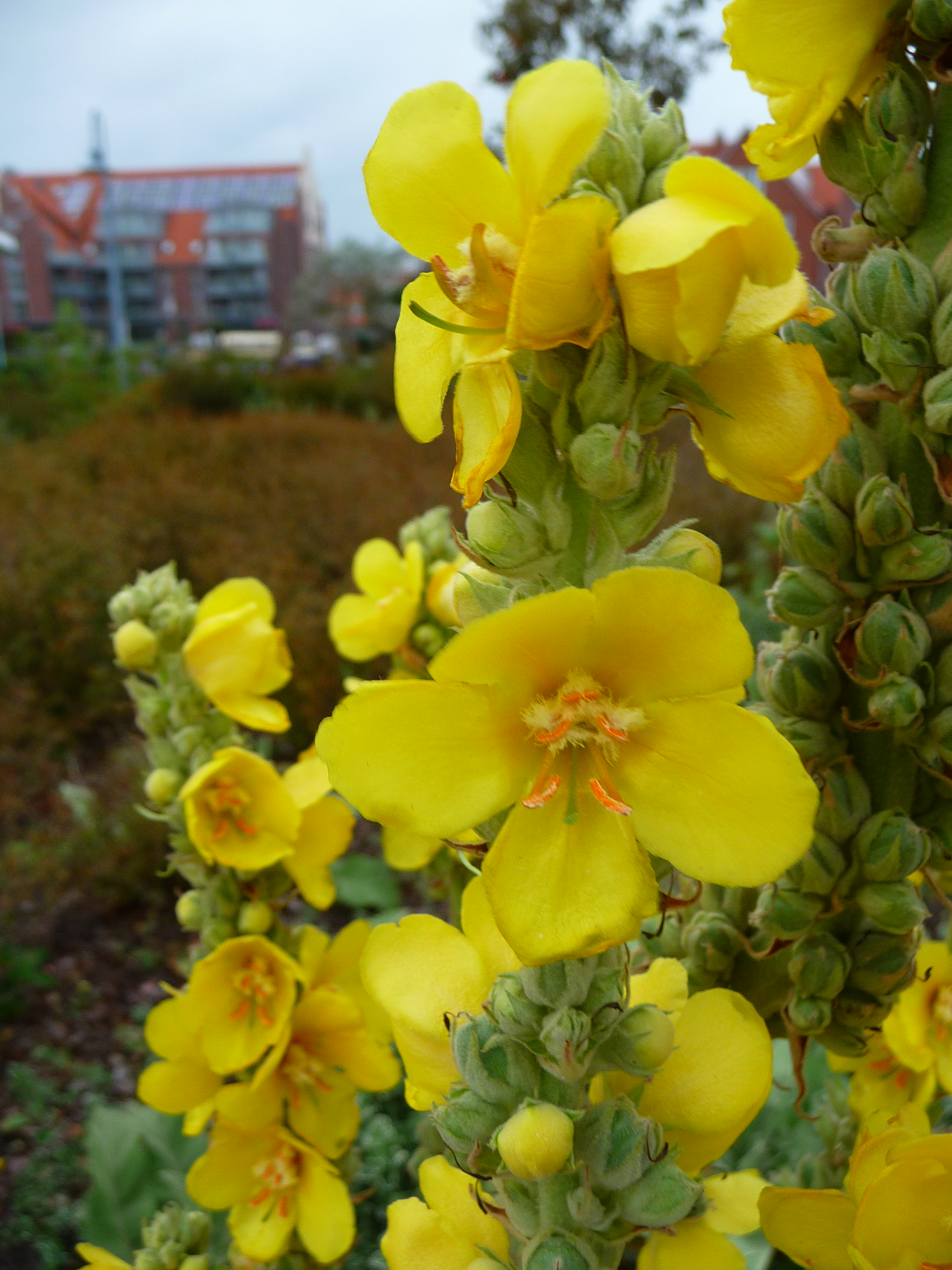 Blüte der Kleinblütigen Königskerze (Verbascum thapsus), fotografiert auf der ostfriesischen Nordseeinsel Juist, (Niedersachsen, Deutschland)